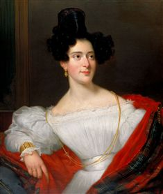 portret (olieverf op doek) dat J.A. Kruseman (1804-1862) in 1831 maakte van Anna Gratia Mariana (Netje) Asser (1807-1893).